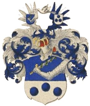 Schwebsi suguvõsa aadlivapp